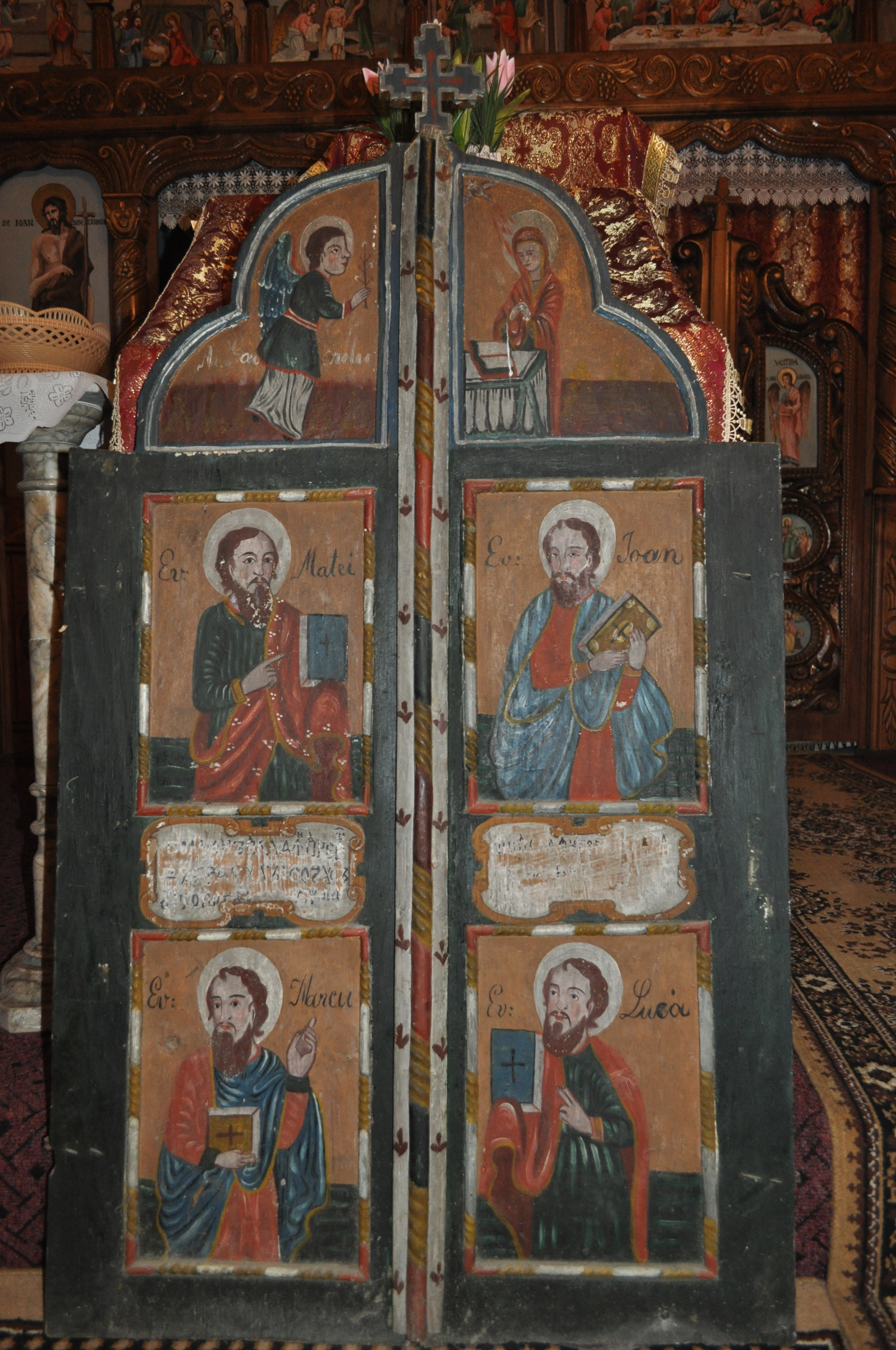 Biserica de lemn "Sfântul Petru" din Mureșenii de Câmpie